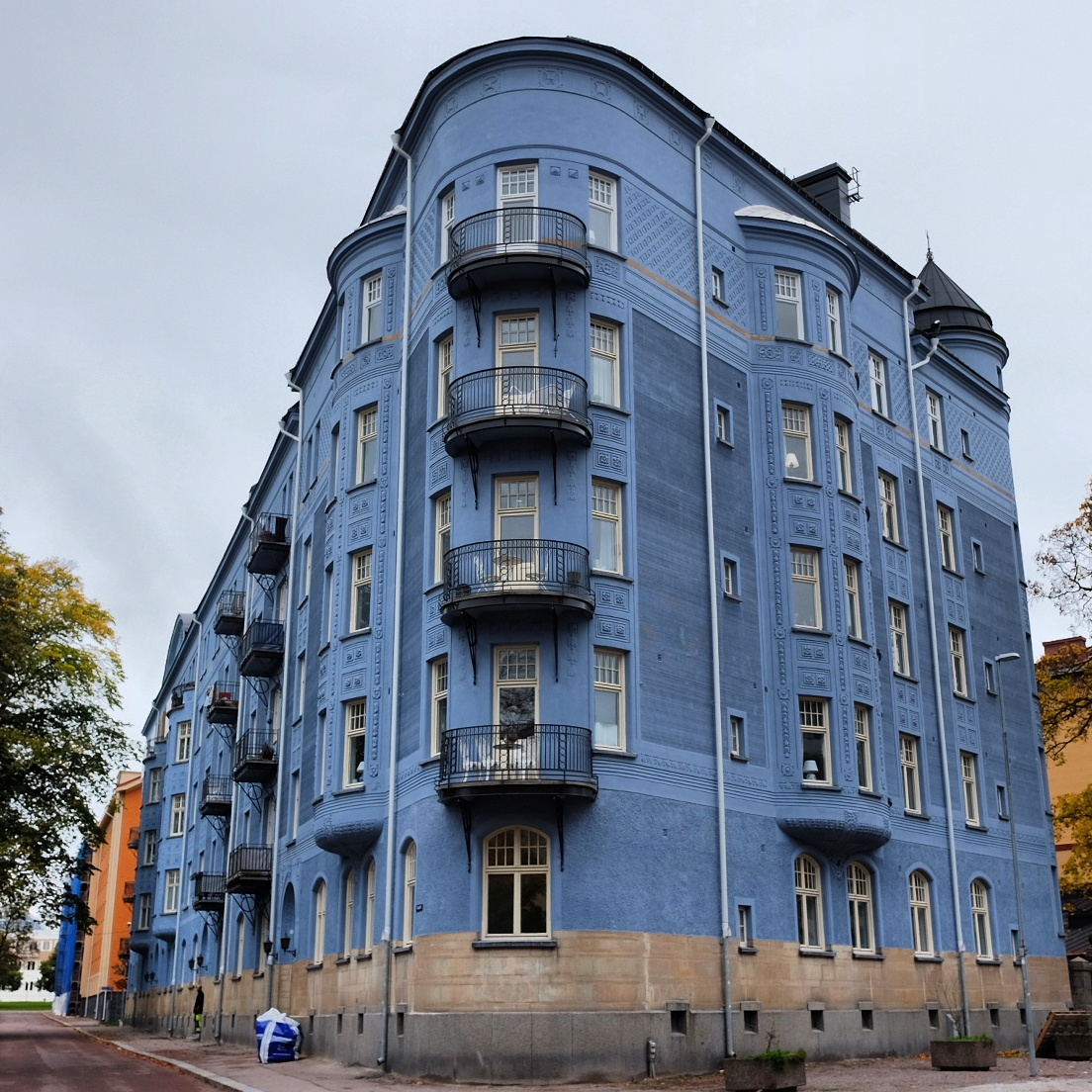 Vasahuset i Uppsala 2017.